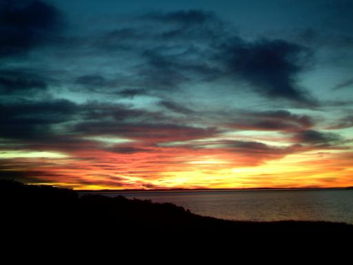 Laguna Negra . Rocha . Uruguay. Forma parte del Sistema nacional de Areas protegidas. Este atardecer ha sido de los más bellos que he disfrutado en mi vida!